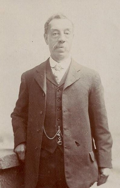 Lord Russell